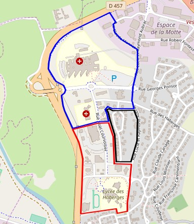 Carte des différents secteurs des Haberges Secteur bleu : Pôle santé Secteur rouge : Zone d'activités Secteur noir : Zone résidentielle